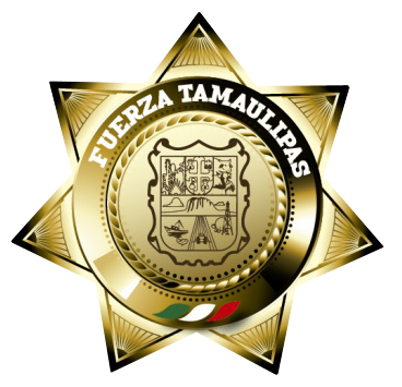 Escudo de la Fuerza Tamaulipas, nuevo nombre de la Policía Estatal de dicho estado mexicano.